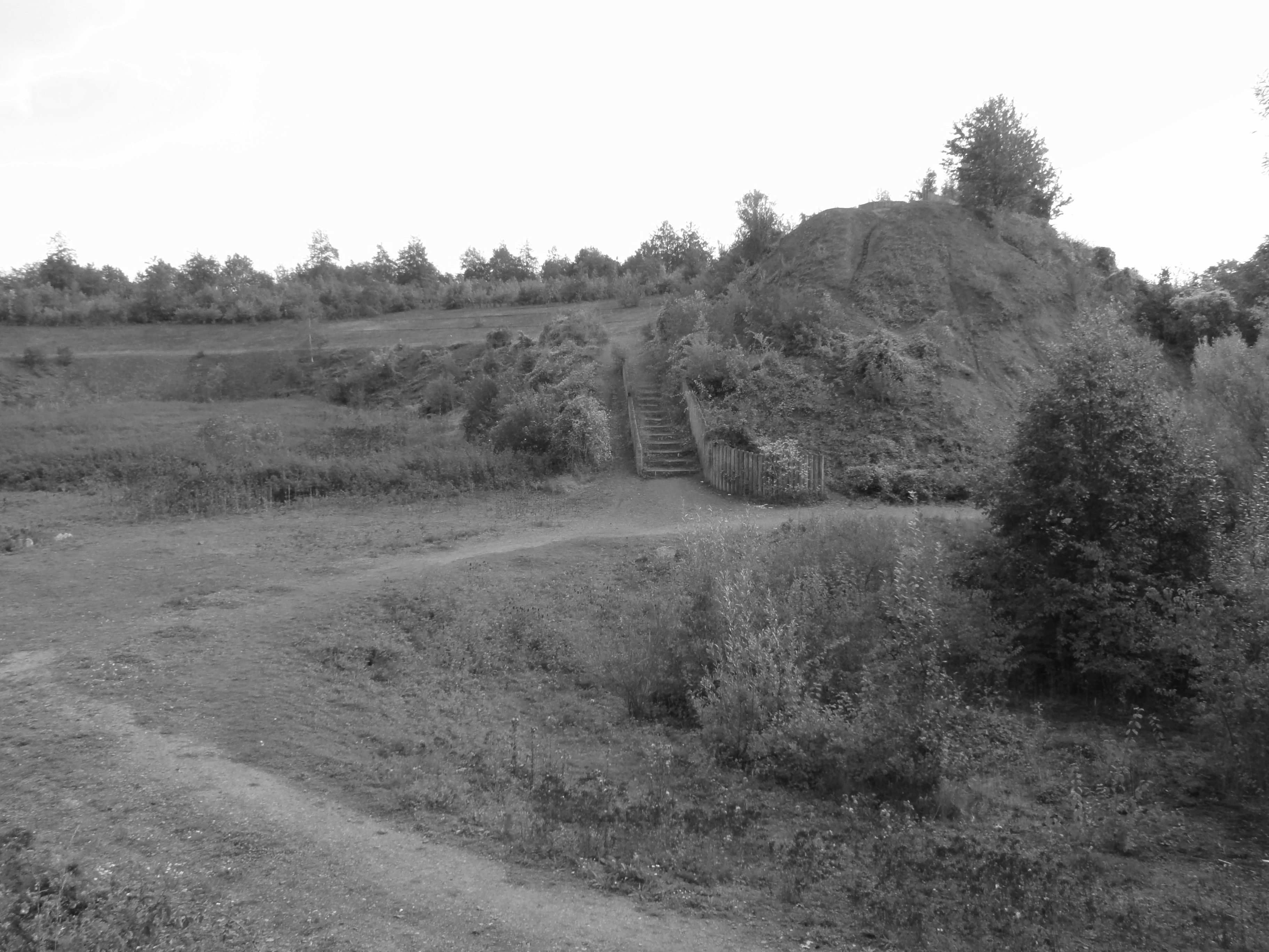 Terril n° 52 dit 2 de Béthune Est, fosse n° 2 de la Compagnie des mines de Béthune dans le bassin minier du Nord-Pas-de-Calais, Bully-les-Mines, Pas-de-Calais, Nord-Pas-de-Calais, France.